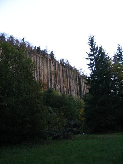 041016-Scheibenberg Steve Moeckel gemeinfrei